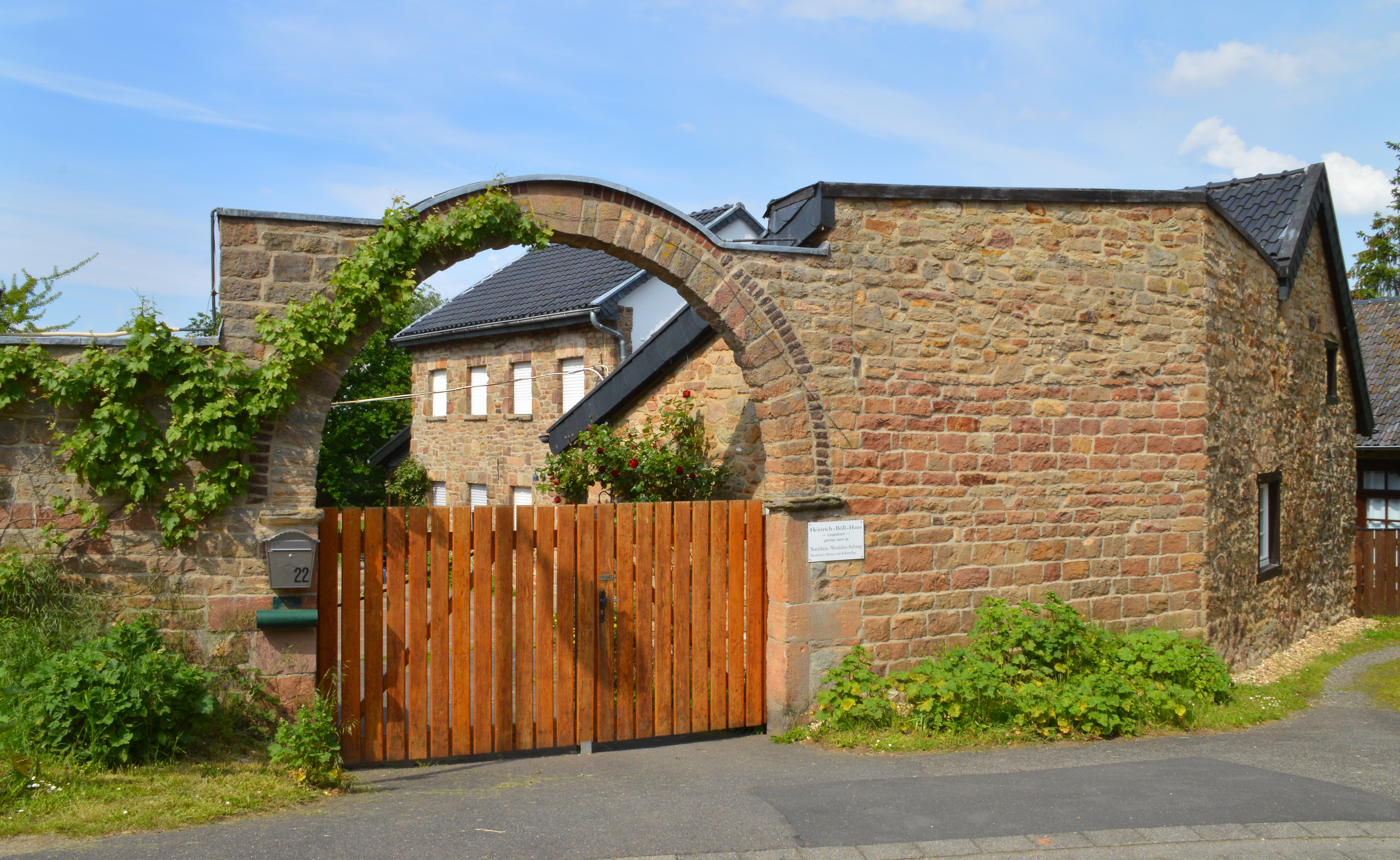 Heinrich Böll lebte hier bis zu seinem Tode. Gezeigt ist das Eingangstor.